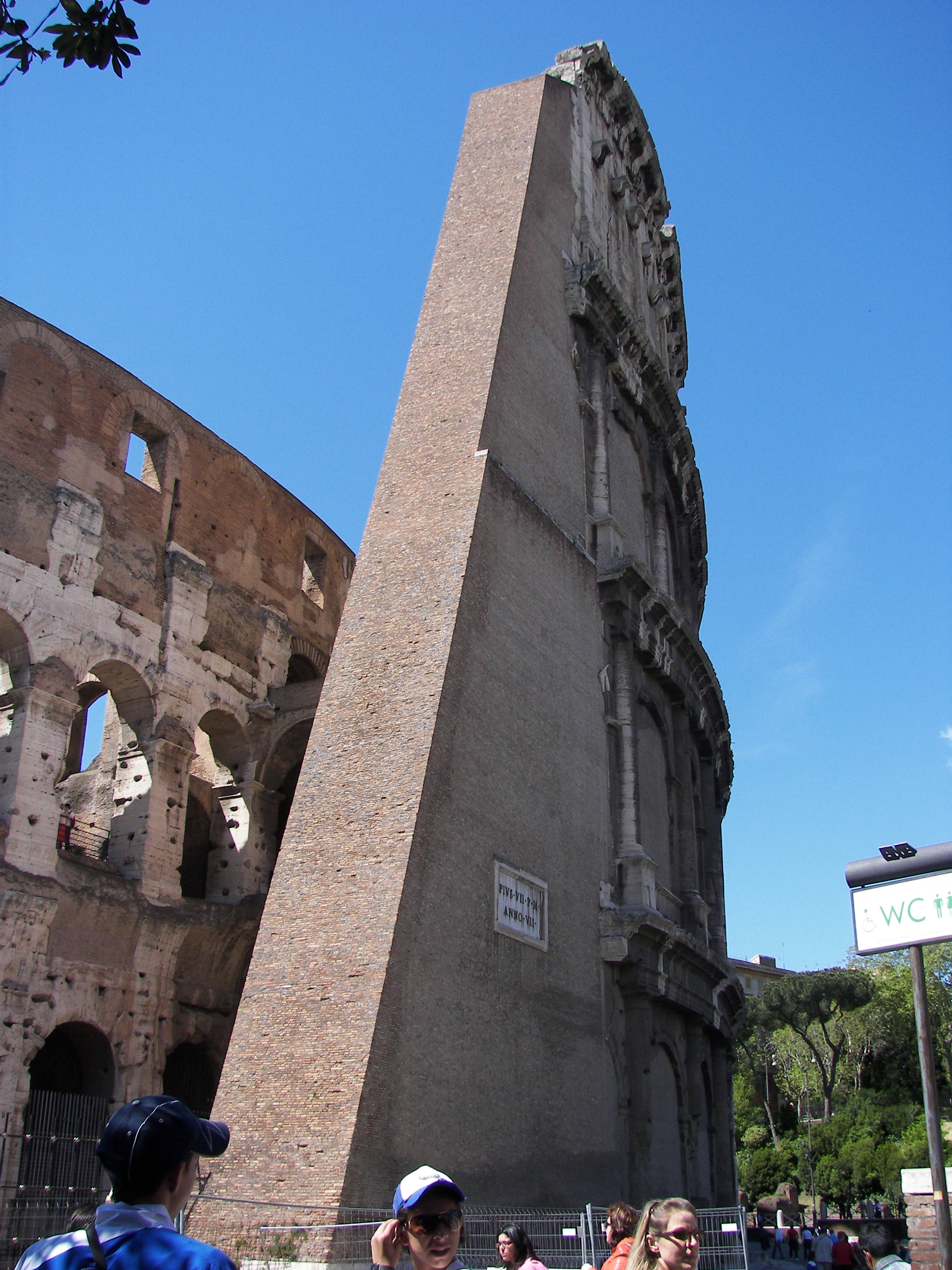 Colosseum in Rome.